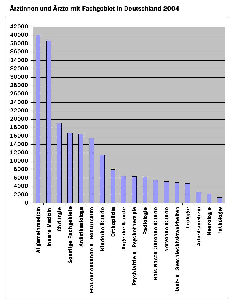 Anzahl der Ärztinnen und Ärzte nach ihrem Fachgebiet in Deutschland